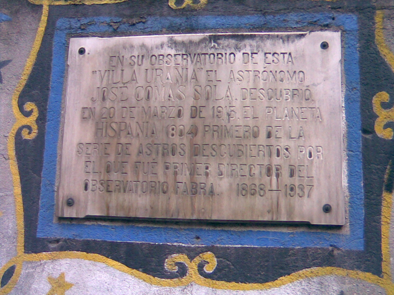 Placa conmemorativa en el muro del edificio de Villa Urania, en Barcelona.